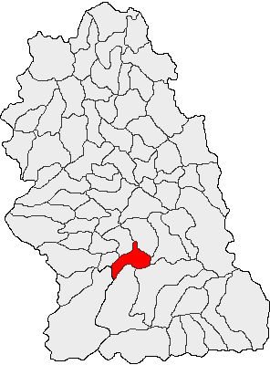 Categorie:Hărţi ale judeţului Hunedoara